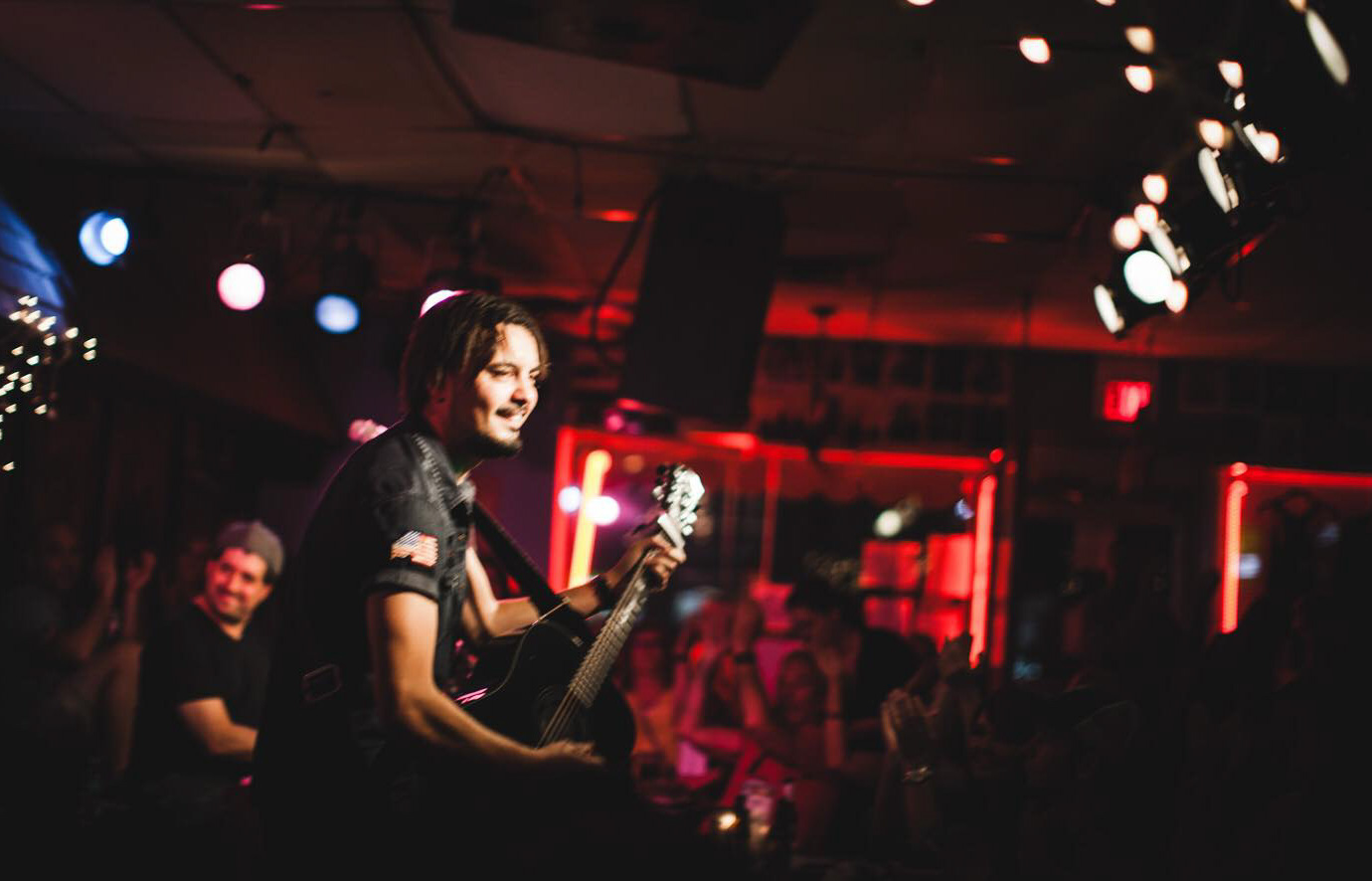 Jamie Meyer at Bluebird Cafe, Nashville